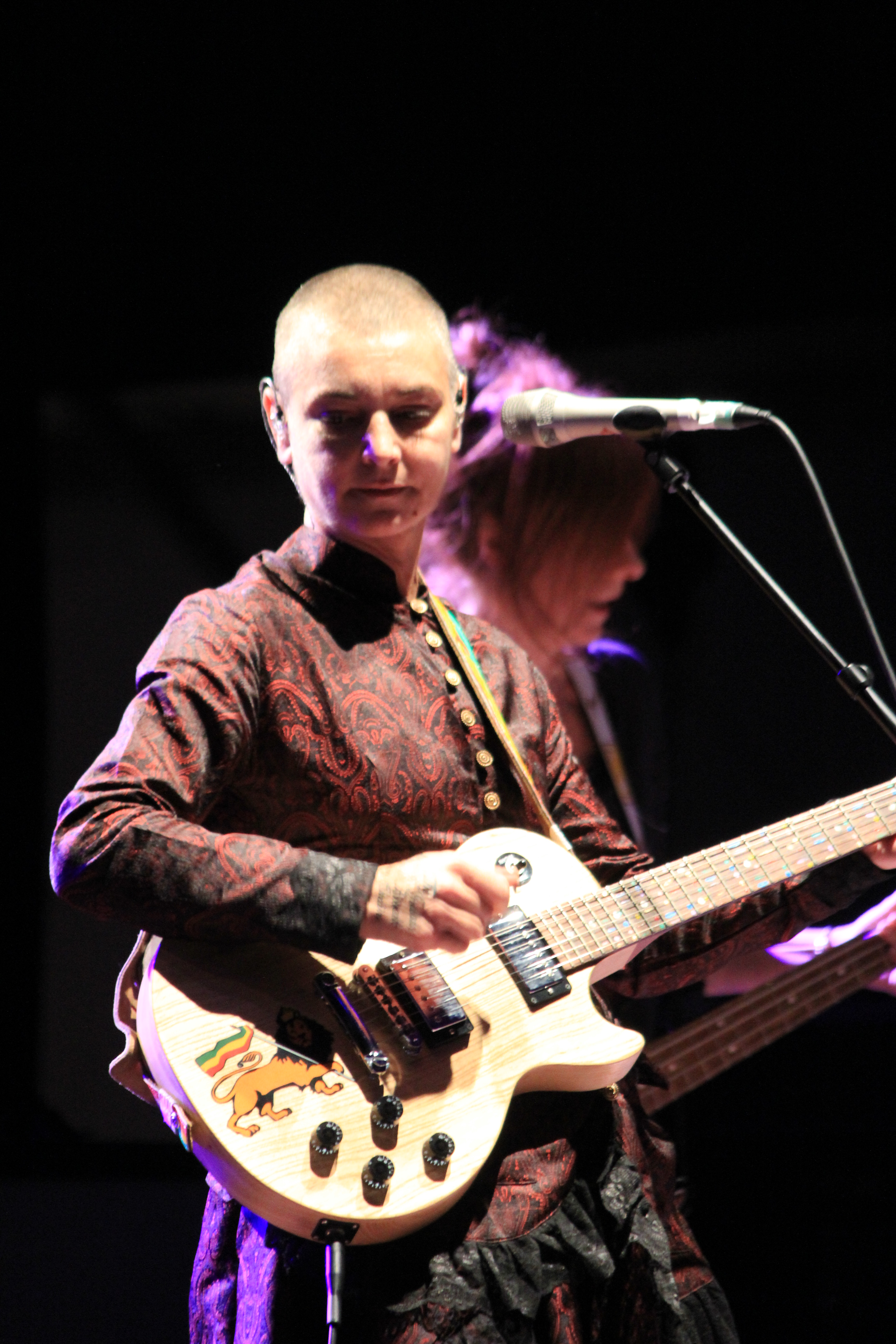 Sinéad O'Connor lors du Festival interceltique de Lorient, le 10 août 2013.